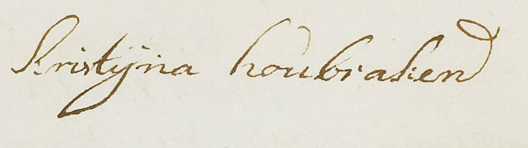 Handtekening Kristijna Houbraken (geb. 1695)